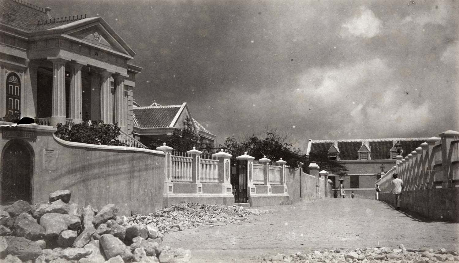 Foto.